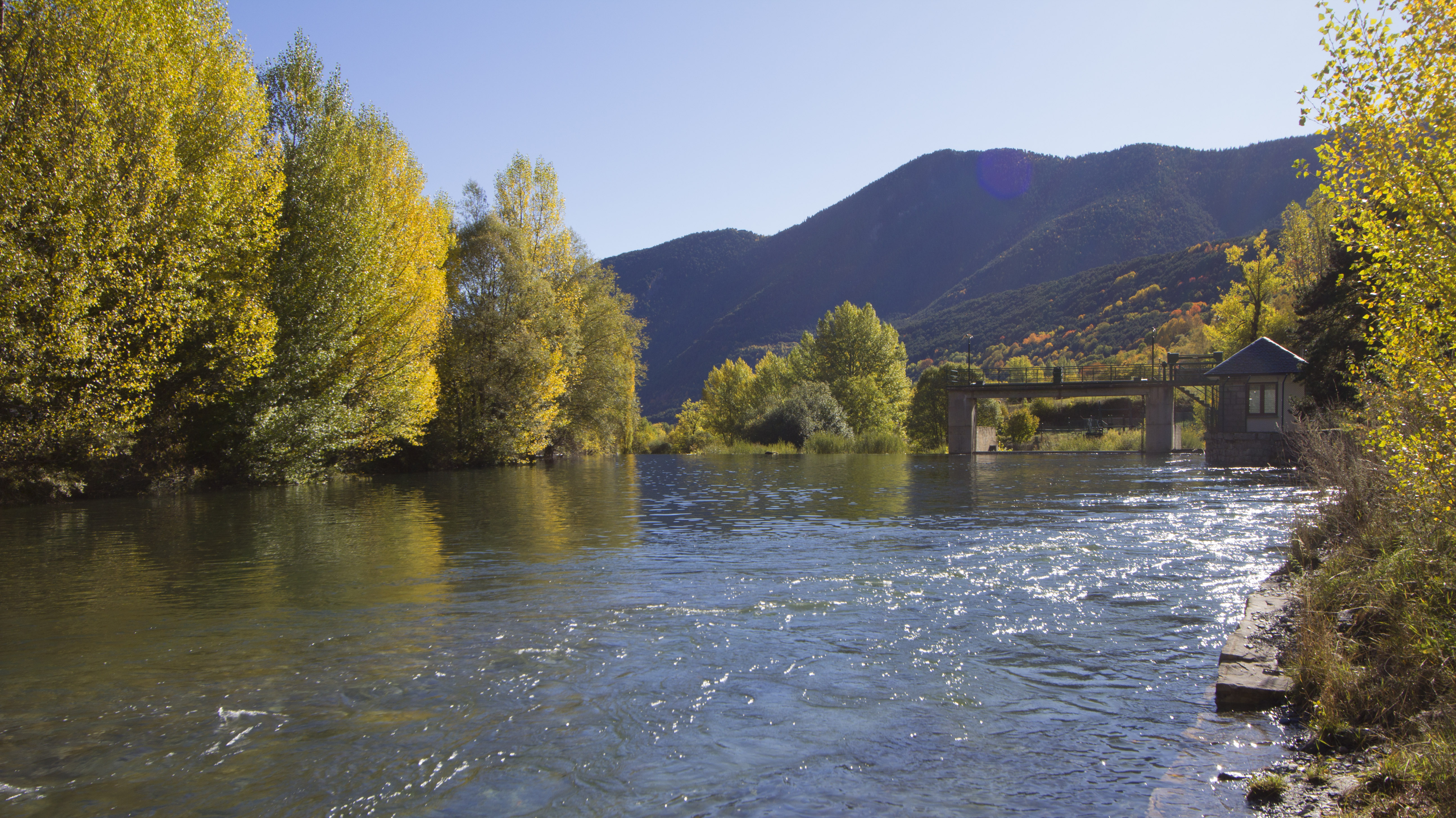 Embassament d'Espot, Pallars Sobirà